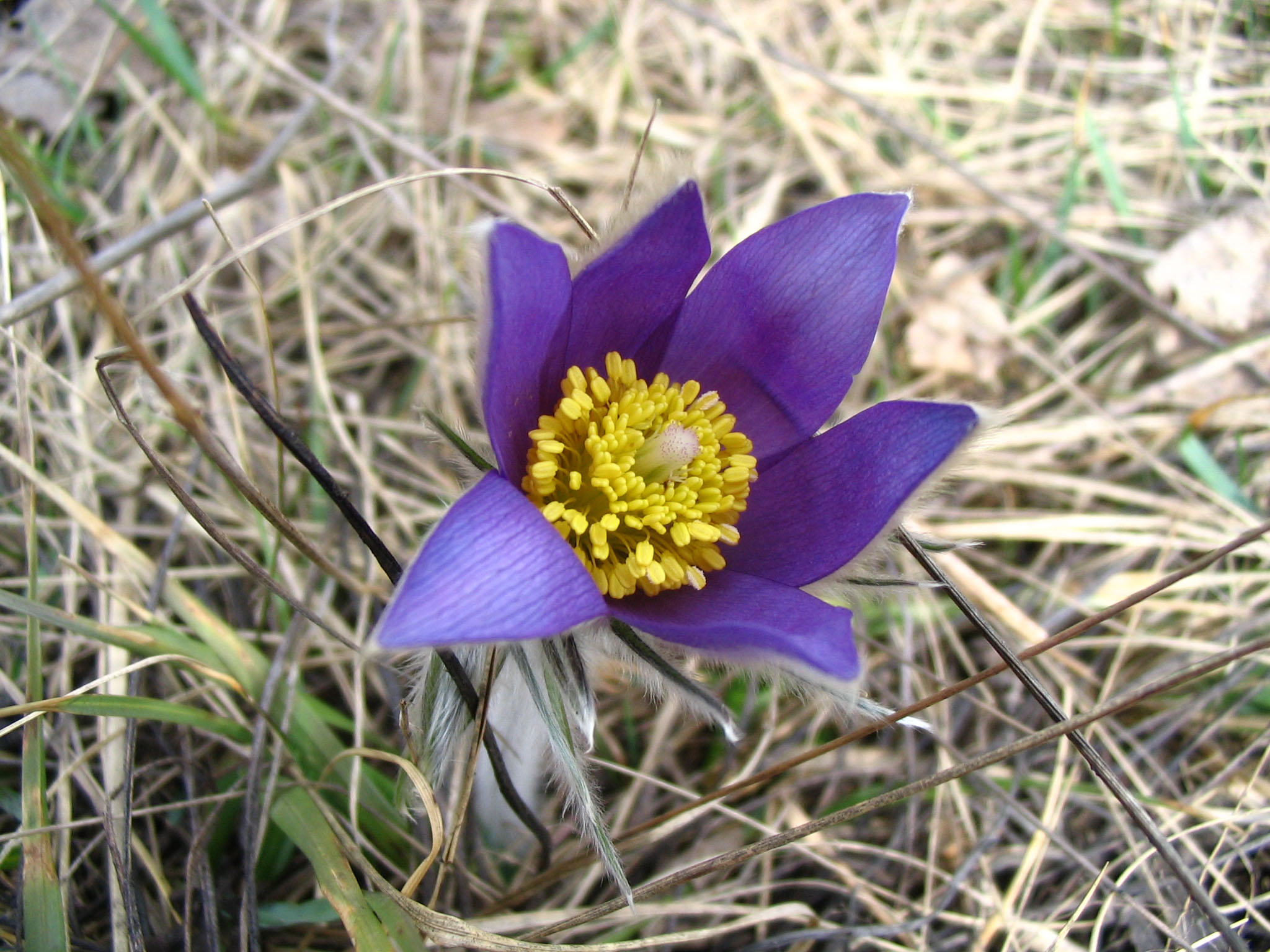 Pulsatilla patens in Belarus